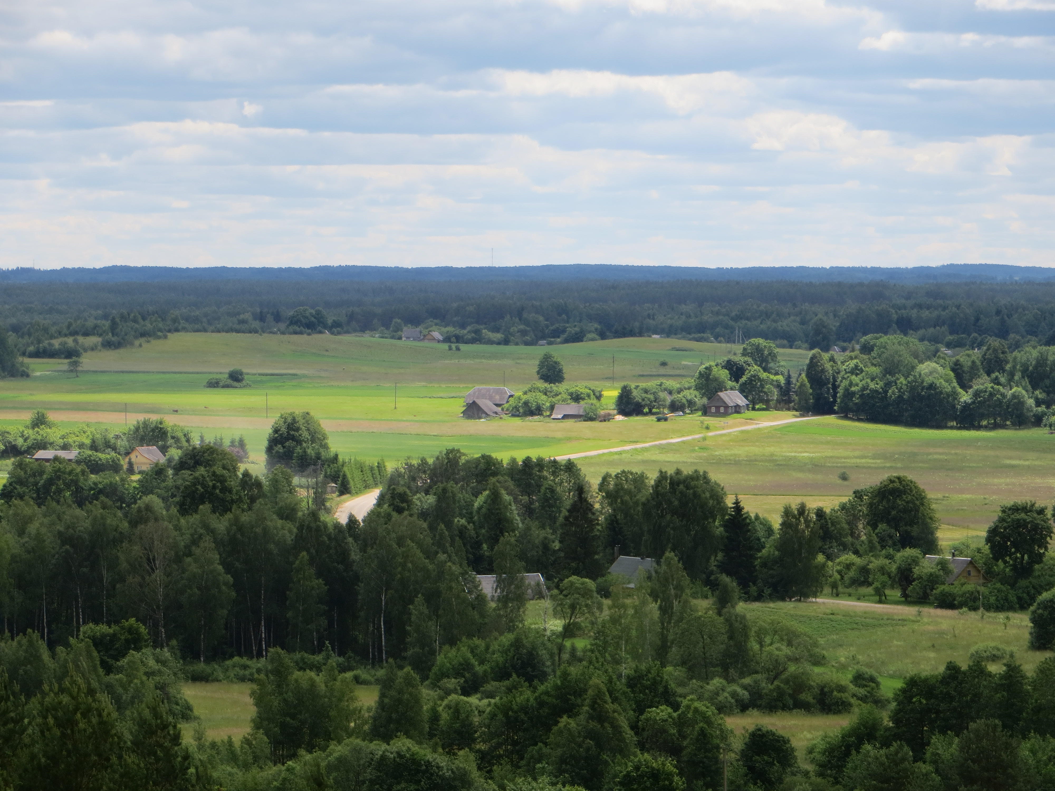 Švenčionėlių sen., Lithuania